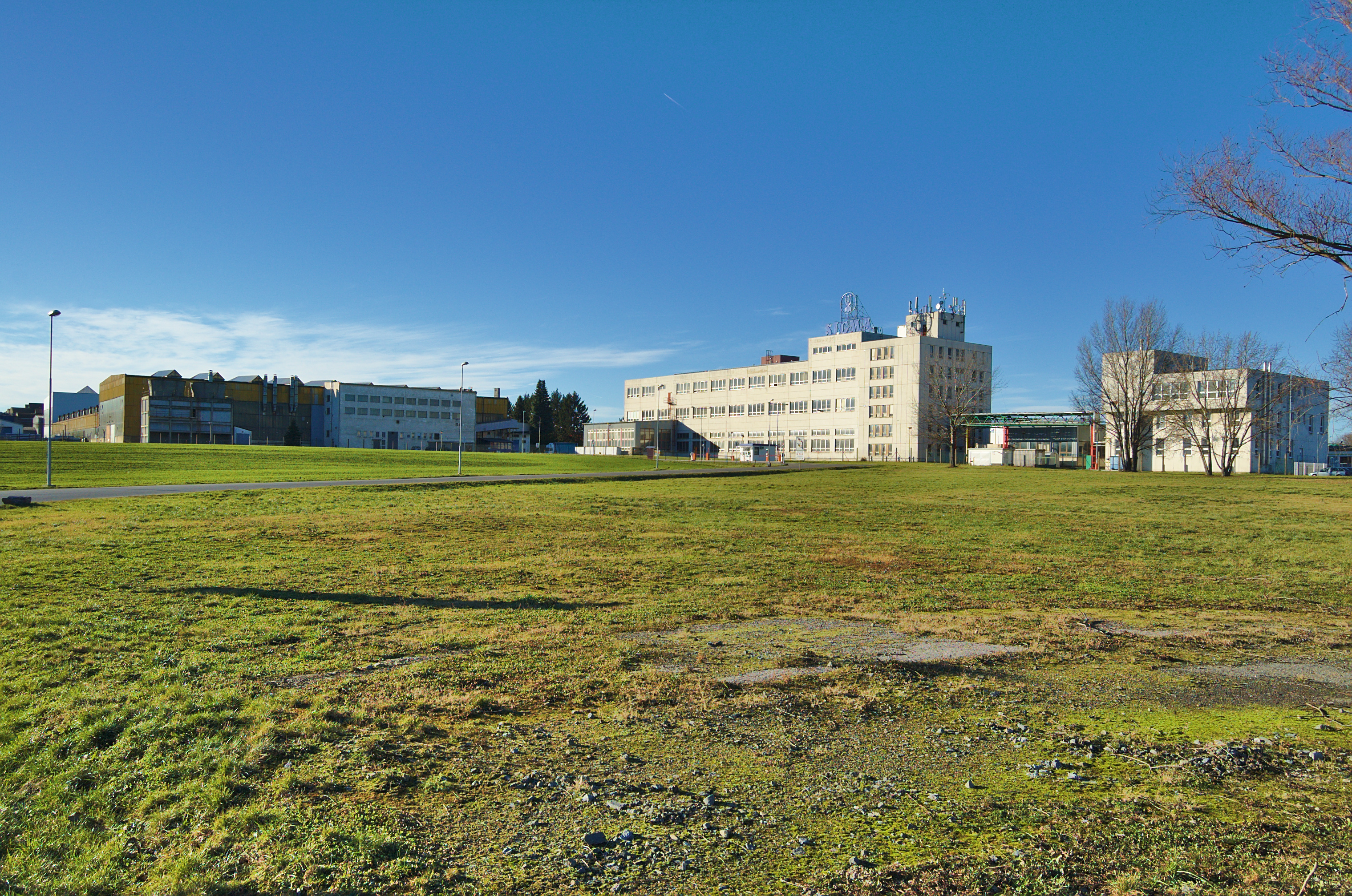 Sigma Lutín, okres Olomouc